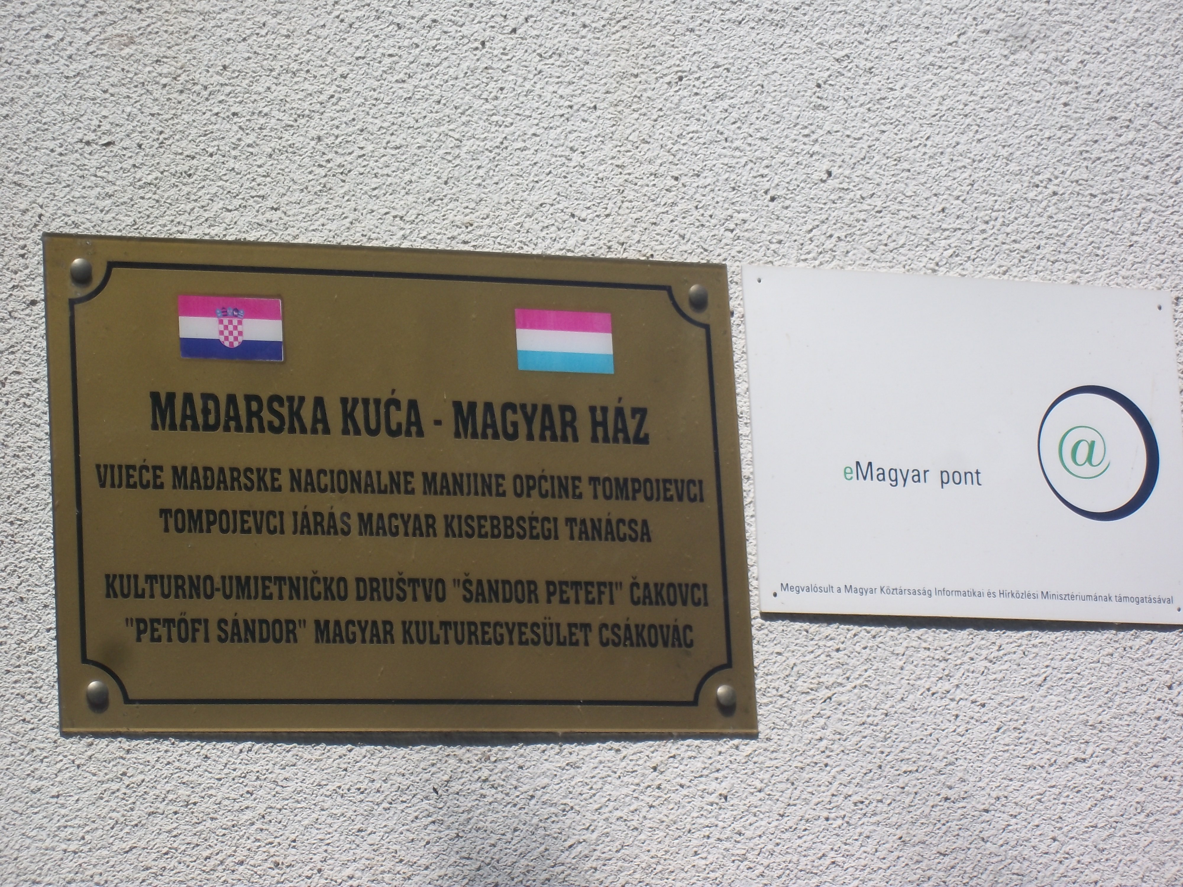 Srpskohrvatski / српскохрватски: Mađarska kuća u naselju Čakovci u Općini Tompojevci u Vukovarsko-srijemskoj županiji (Republika Hrvatska).